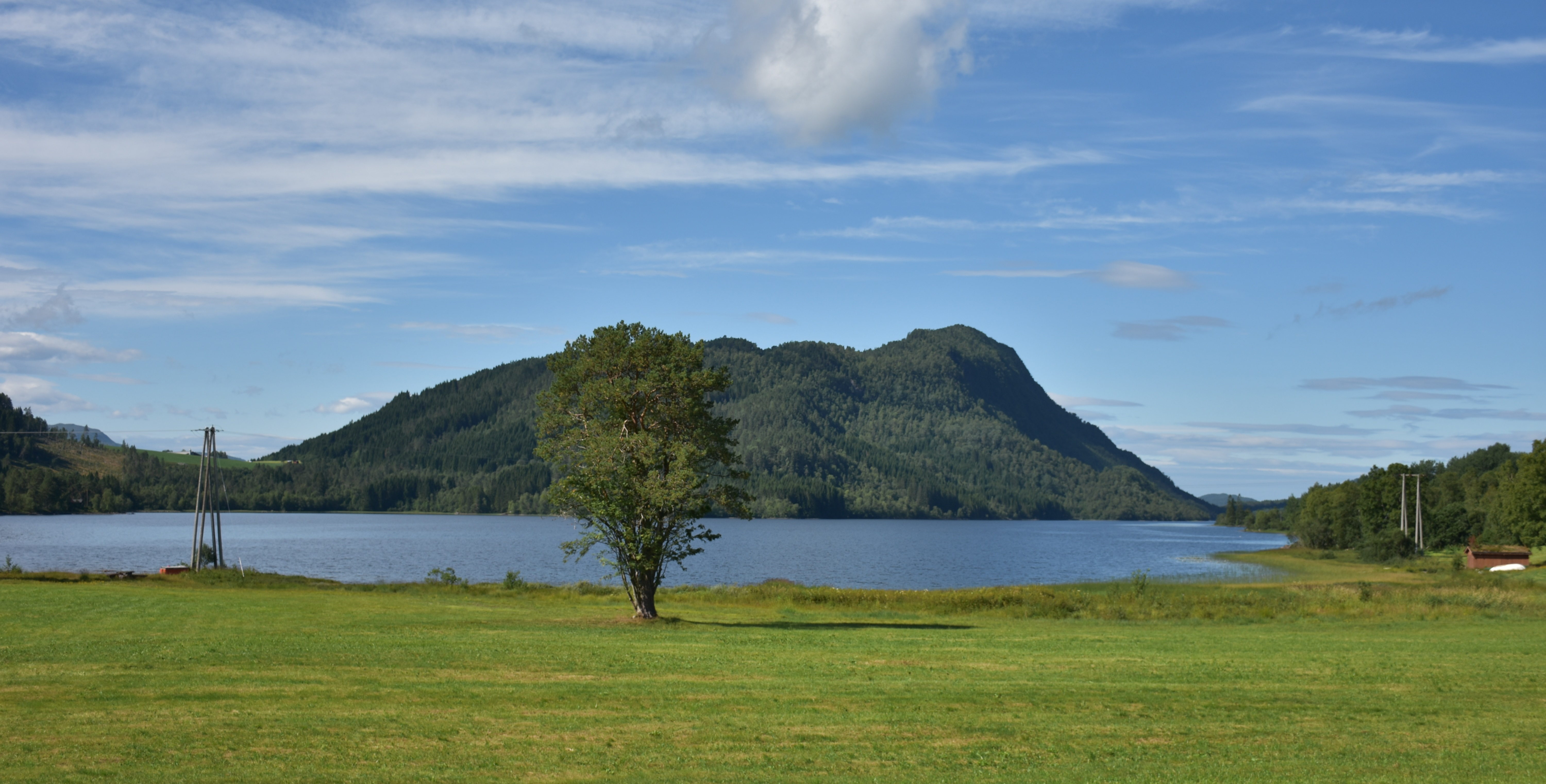 Engsetdalsvatnet i Skodje kommune, sett østfra